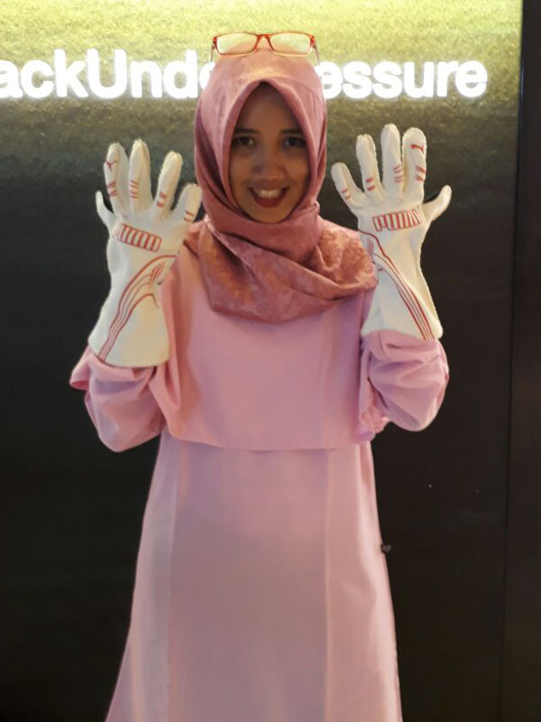 Wanita berhijab yang mengenakan sarung tangan anti api Puma Avanti